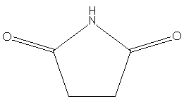 Structure of Succinimide